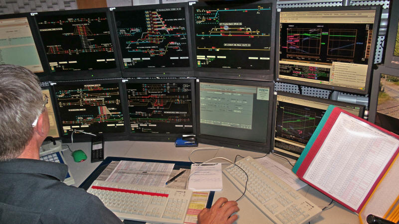 ESTW Bildschirmarbeitsplatz in der Betriebszentrale der DB in Duisburg